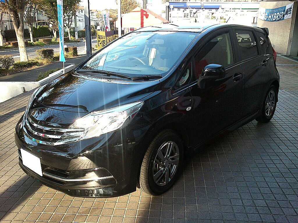 日産ノート E12 ライダー（市販型）